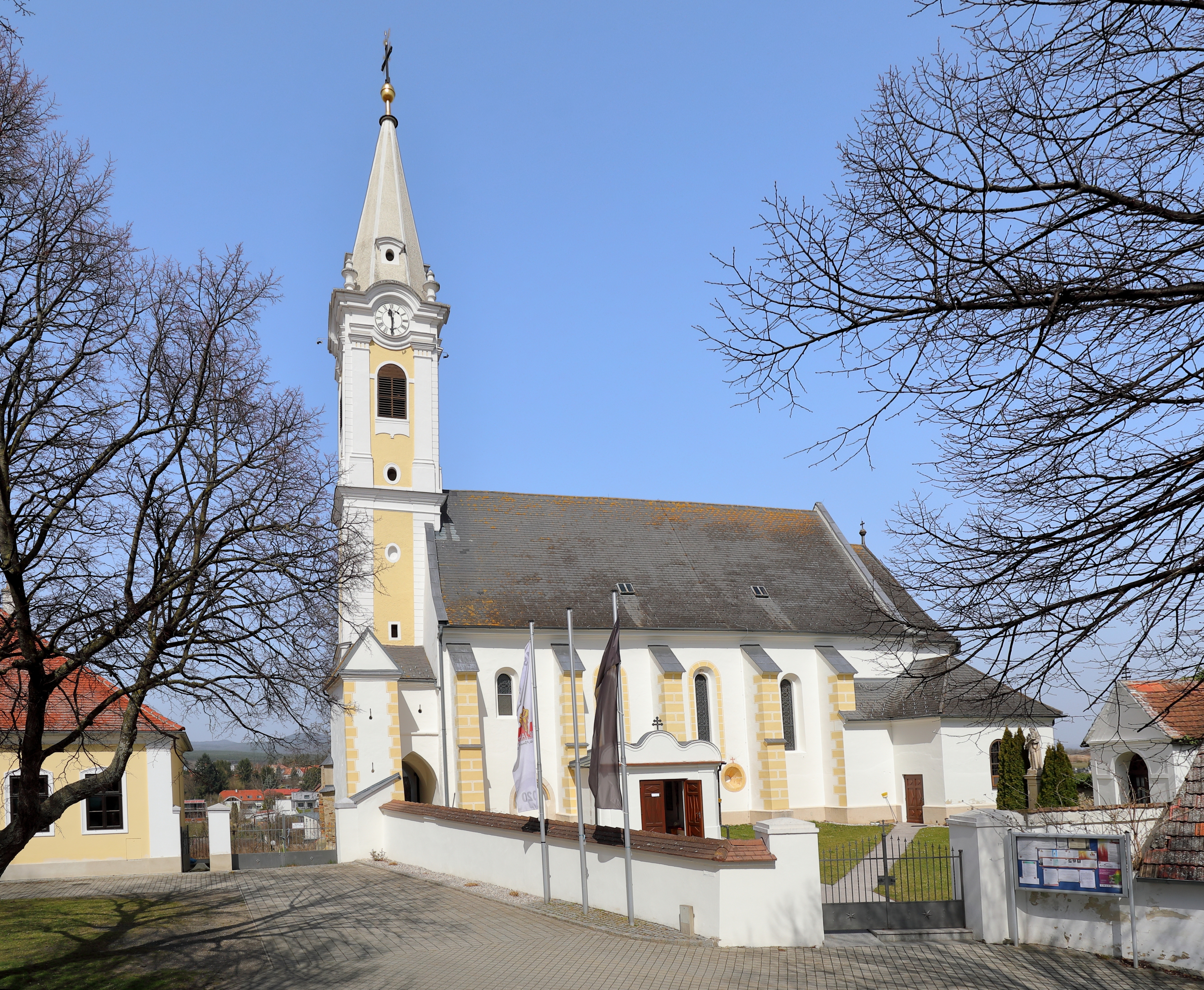 Südansicht der röm.-kath. Pfarrkirche hl. Andreas in der burgenländischen Marktgemeinde Draßmarkt.Die Kirche wurde auf einem Hügel im Ort errichtet. Sie ist ein Saalbau aus dem 16. Jahrhundert mit barocken Veränderungen und wurde 1899 erweitert. An das fünfjochige Schiff schließt im Westen ein dreigeschoßiger Turm mit Steinhelm an. Im Innenraum finden sich barocke Heiligenfiguren sowie ein moderner Volksaltar.